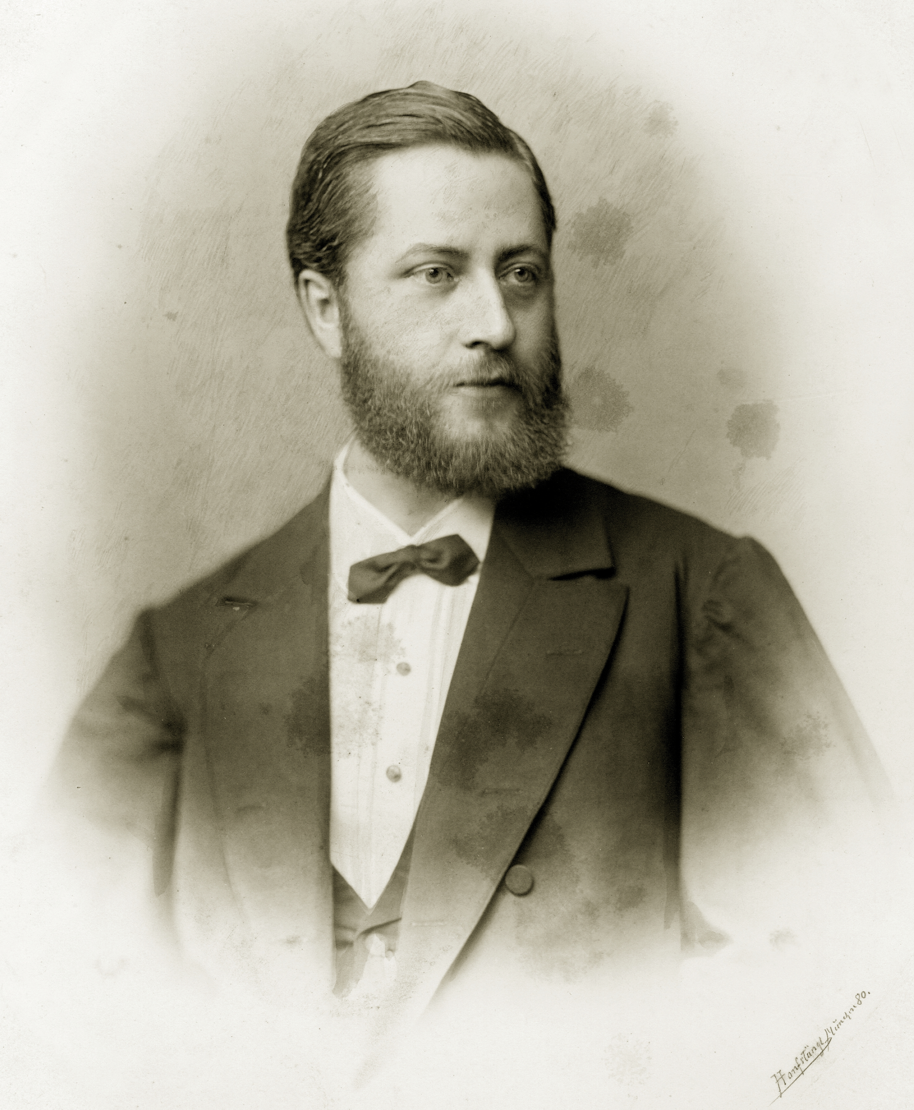 Ludwig August von Müller, Foto von 1880